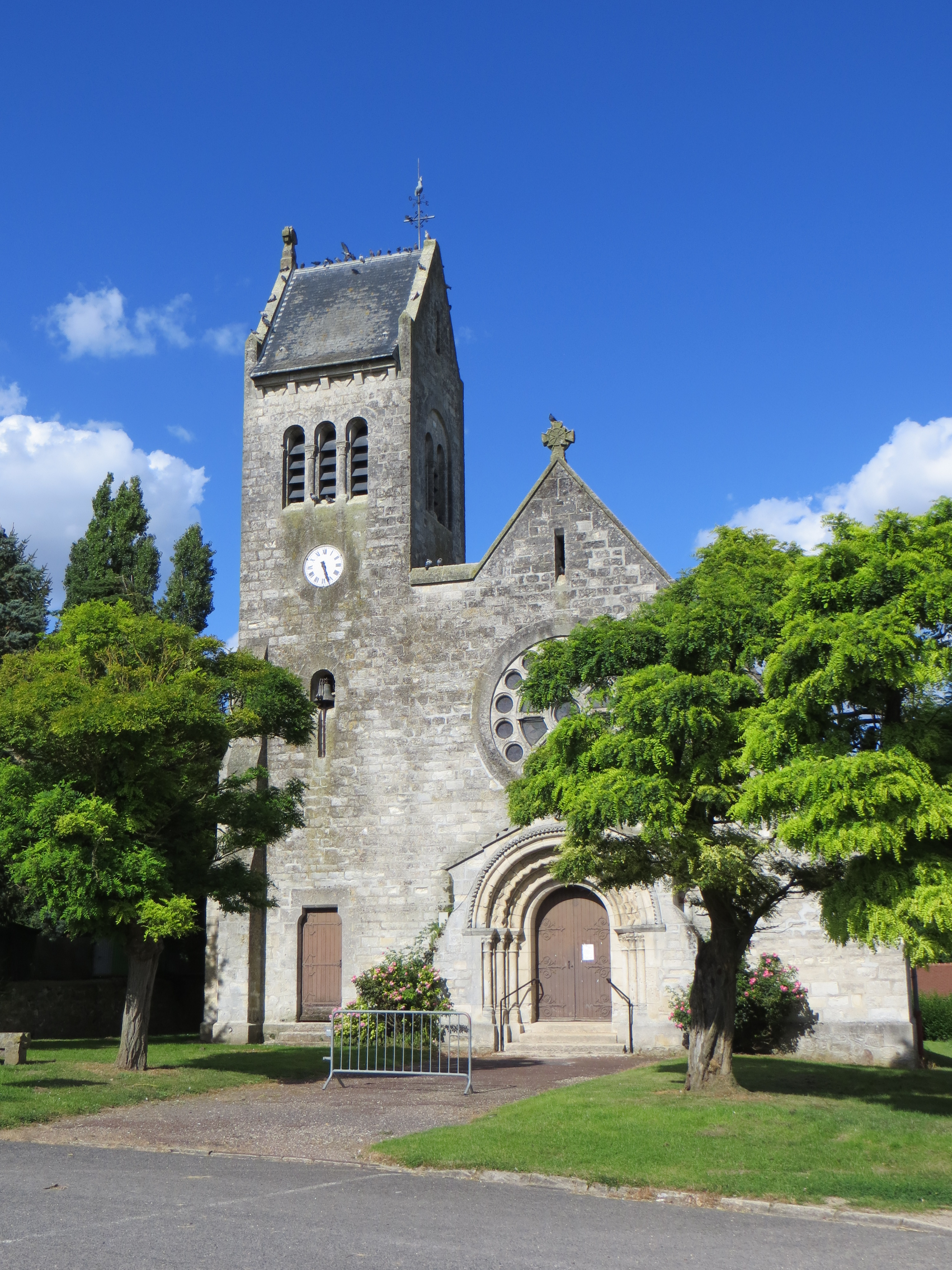 Vue générale de l'église